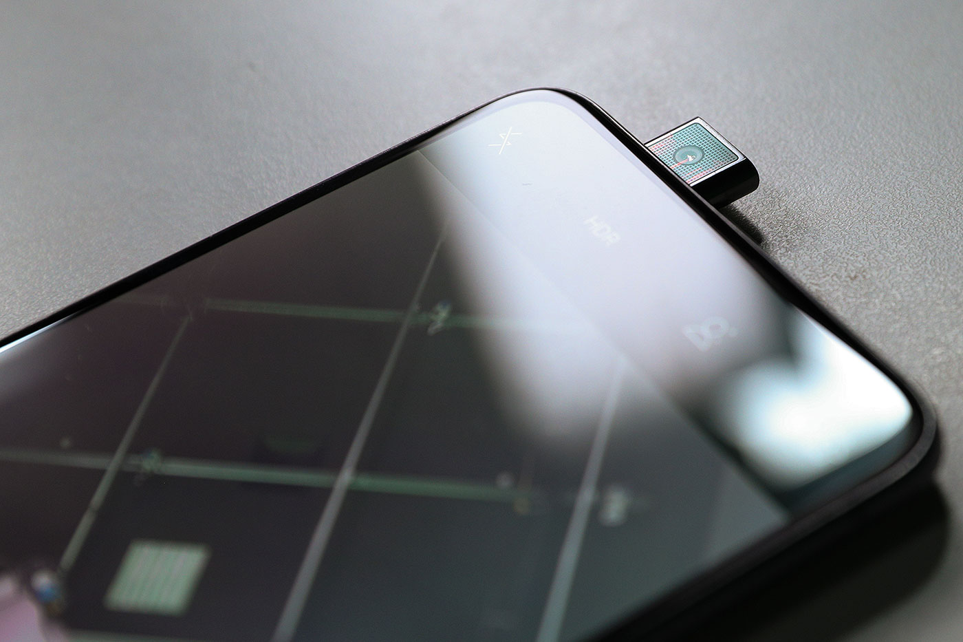 Càmera retràctil del smatphone Vivo Nex